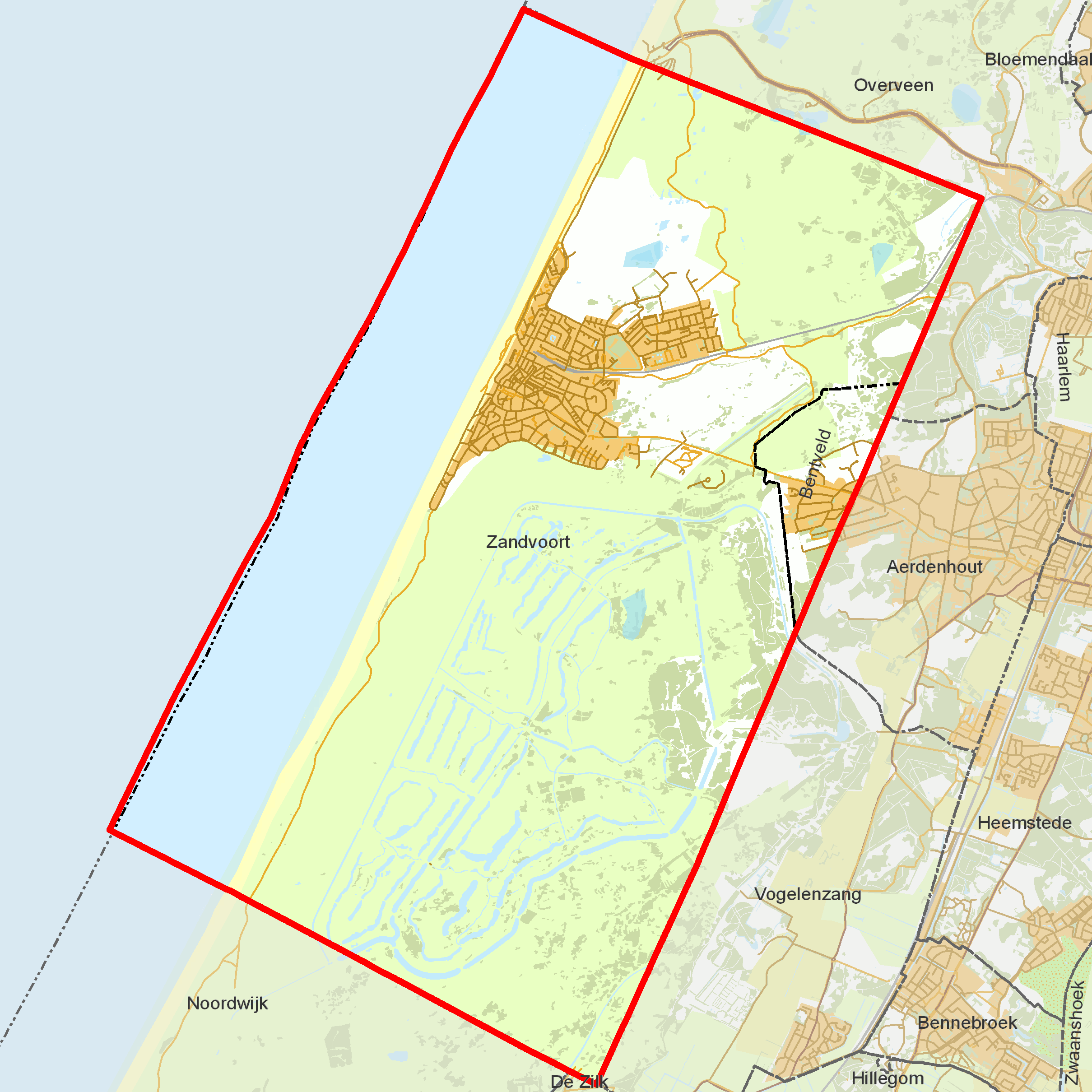 BAG woonplaatsen - Gemeente Zandvoort.png